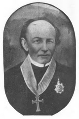 fotografia que retrata o Padre Inácio de Sousa Rolim (1800-1899), o Padre Rolim, sacerdote considerado fundador da cidade de Cajazeiras-PB-Brasil.